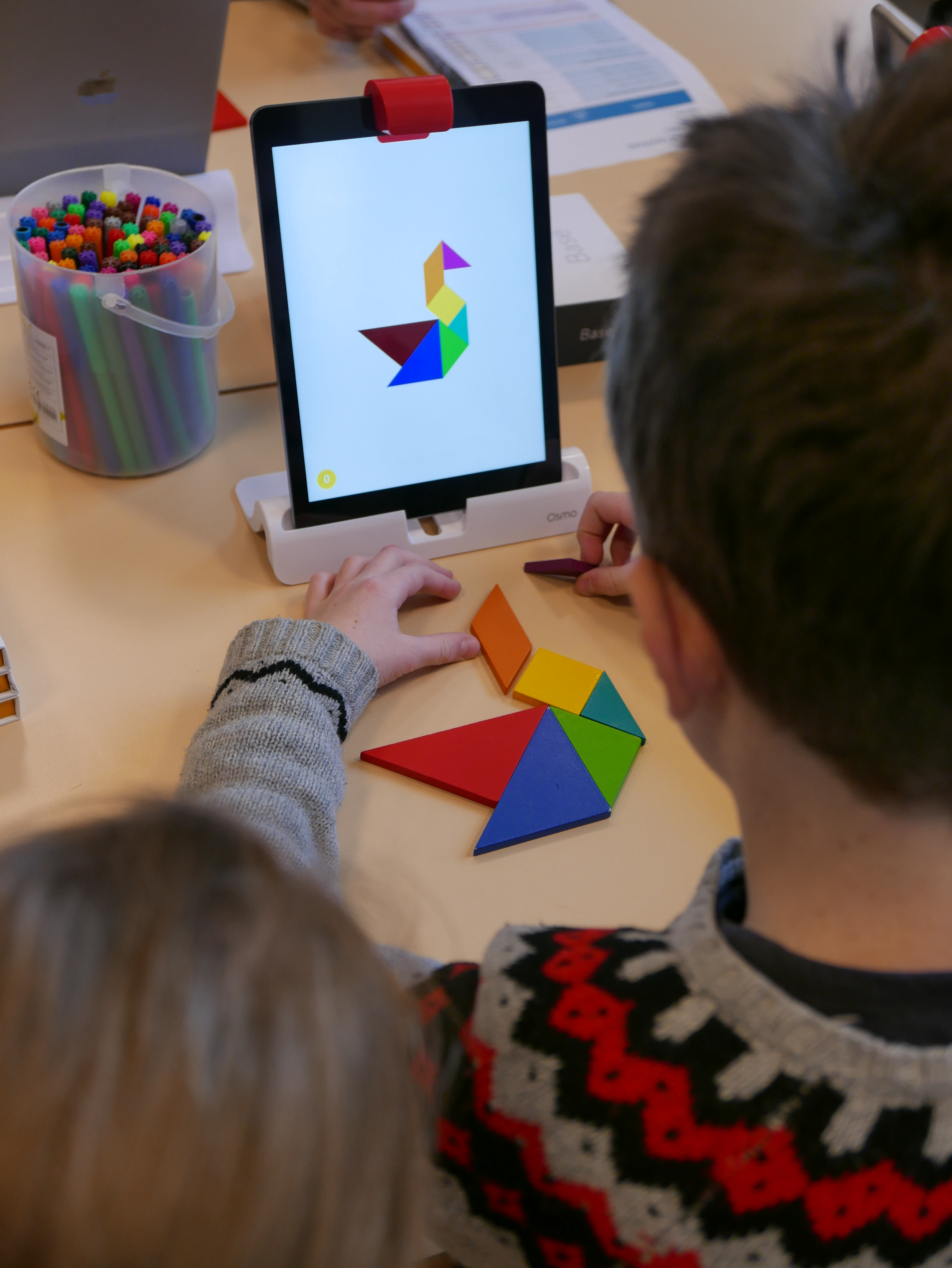 Atelier enfant